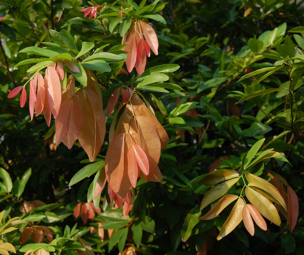 Cynometra cauliflora leaves. Bogor, West Java, Indonesia